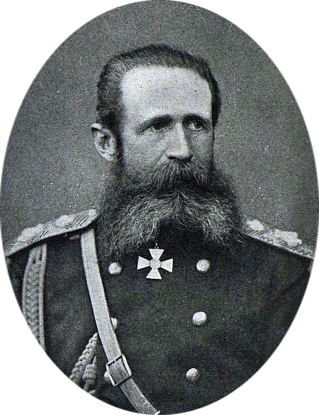 Генерал-адъютант Гурко Иосиф Владимирович